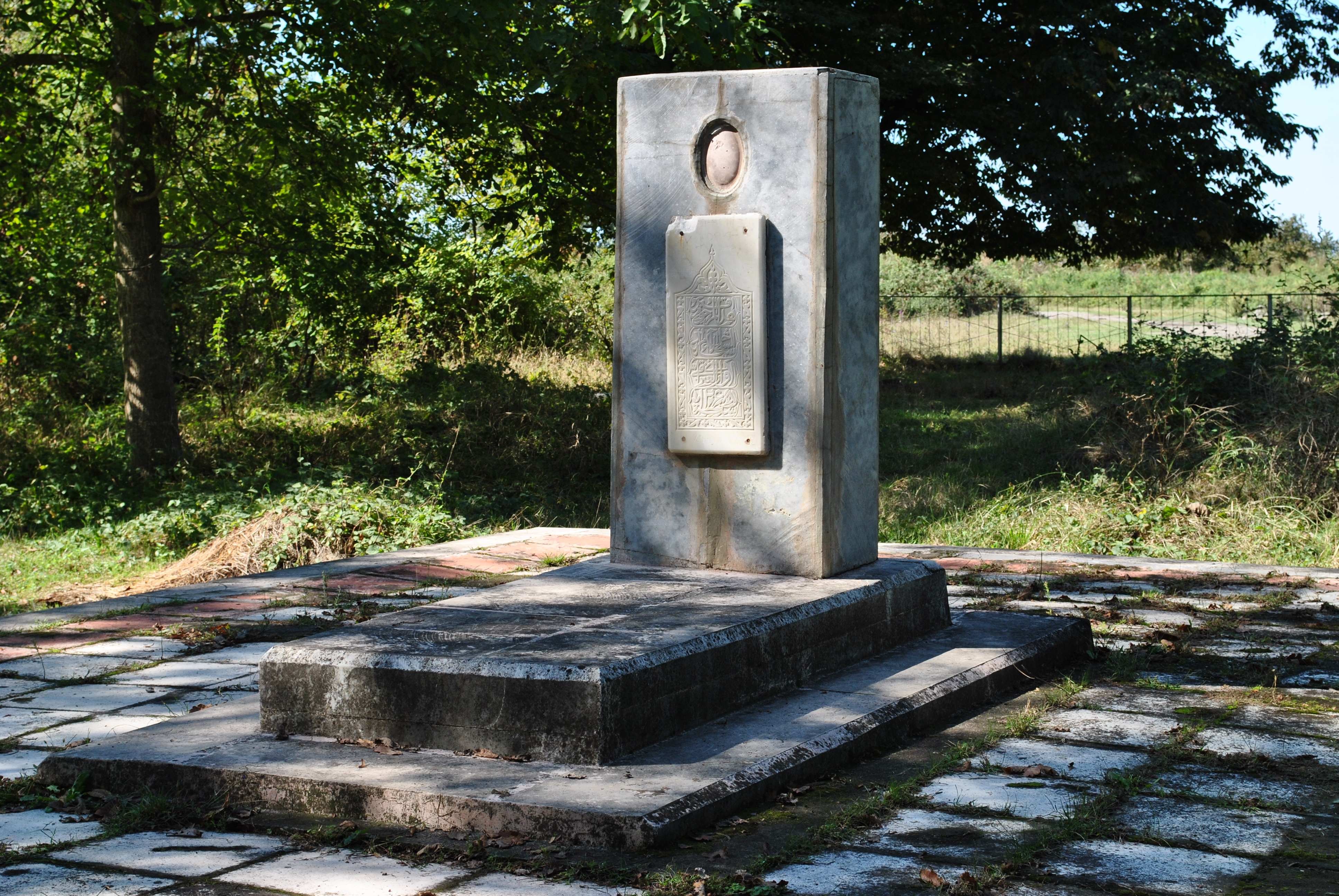 Hacı Muradın məzarı